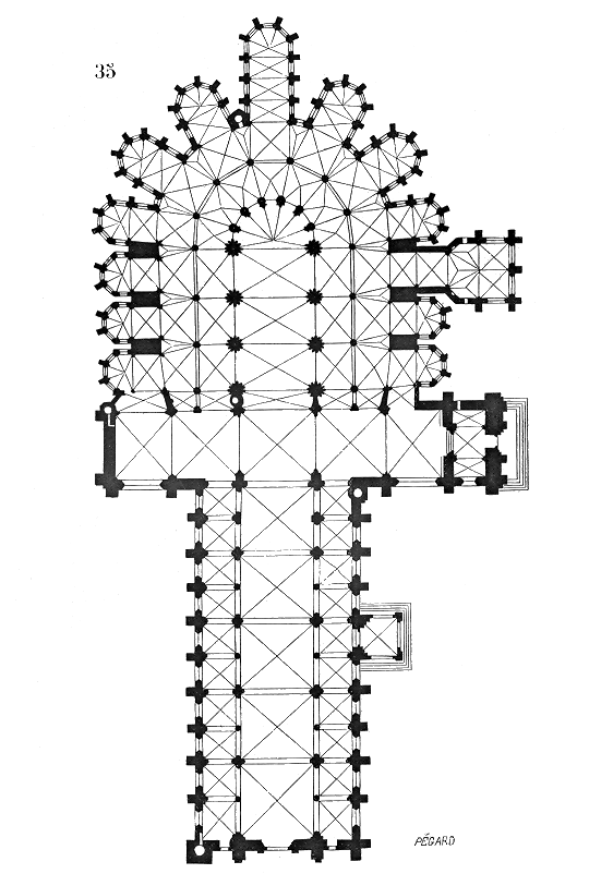 ...la nef romane de la cathédrale du Mans fut remaniée; on reprit les piles et les parties supérieures de la nef, qui fut alors voûtée ainsi que les transsepts. Ces voûtes se rapprochent, comme construction, non du système adopté dans l'Île-de-France et le Soissonnais, mais de celui qui dérivait des coupoles des églises de l'Ouest...